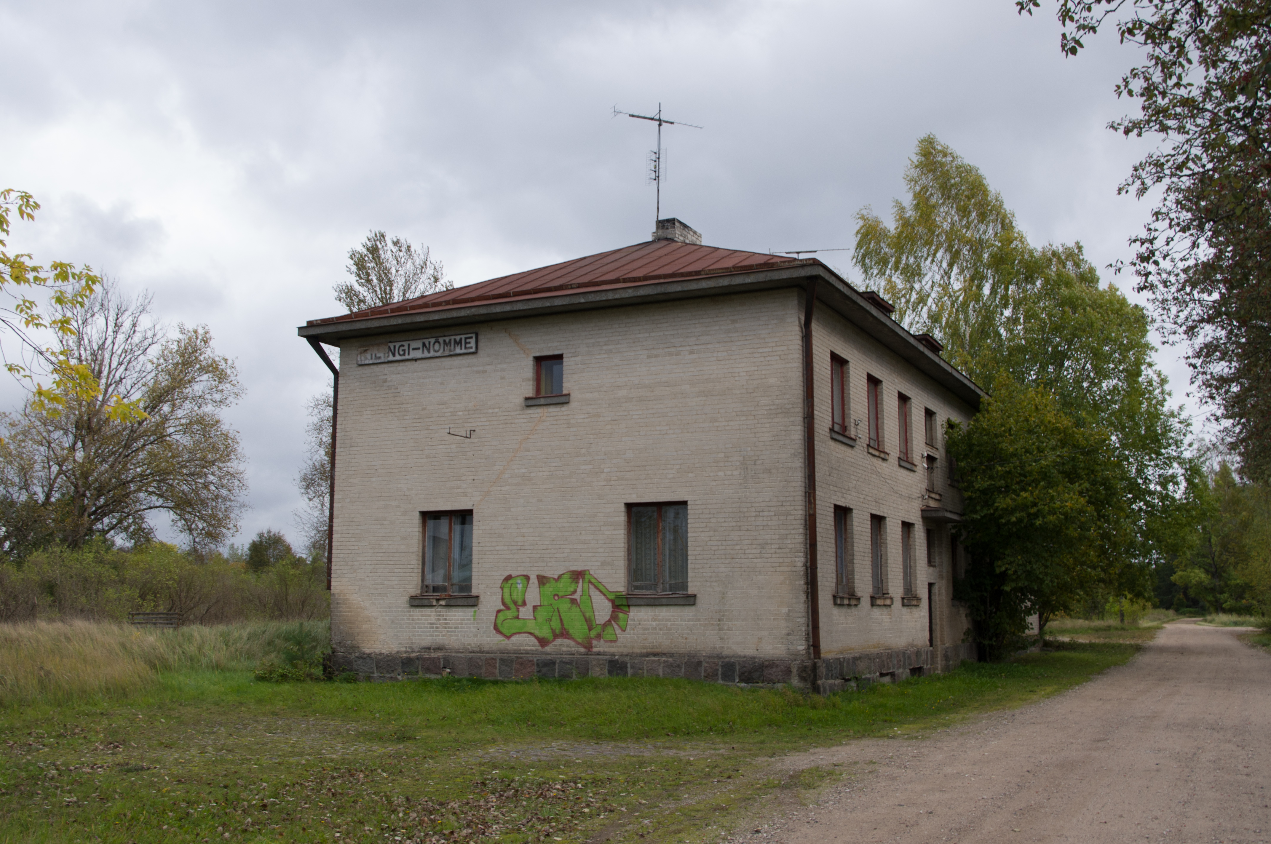 Kilingi-Nõmme raudteejaam